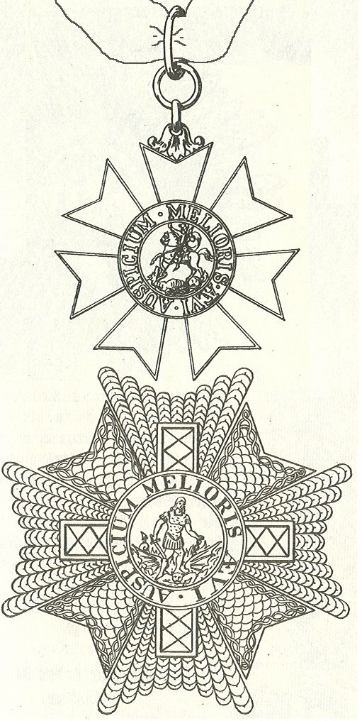 Scan van Blz. 106 van het boek "Handbuch der Ritter- und Verdienstorden " uitgegeven 1893 door Weber.Tekening van de in 1902 overleden Maximilian Gritzner. Robert Prummel 10 jul 2008 16:40 (CEST)